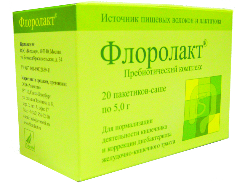 Упаковка БАД "Флоролакт", саше 5 г, № 20